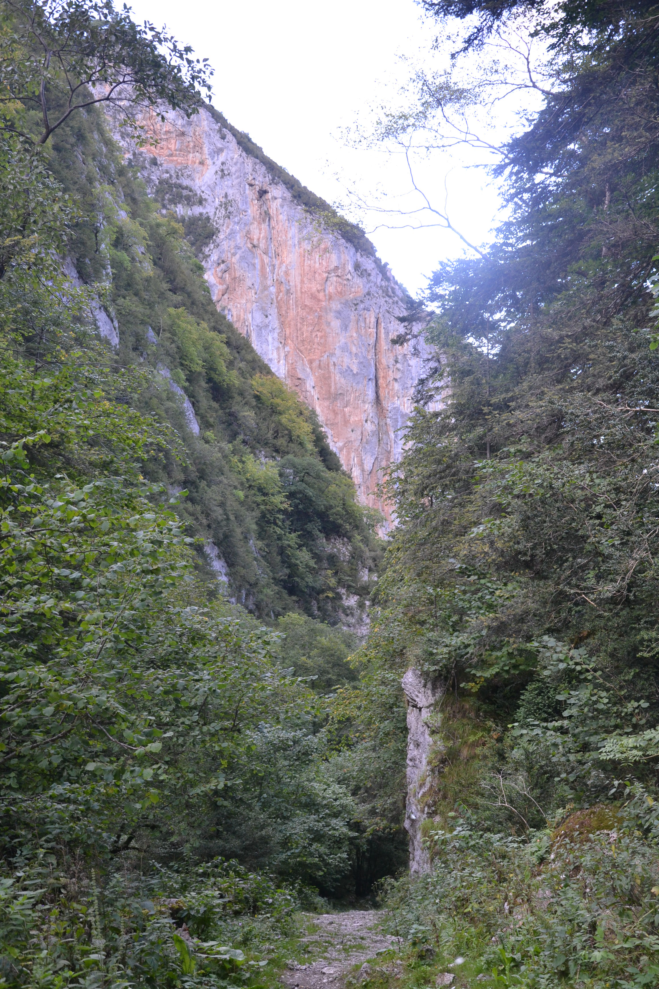 Paysage des gorges de la Frau (Montségur, Ariège, France).